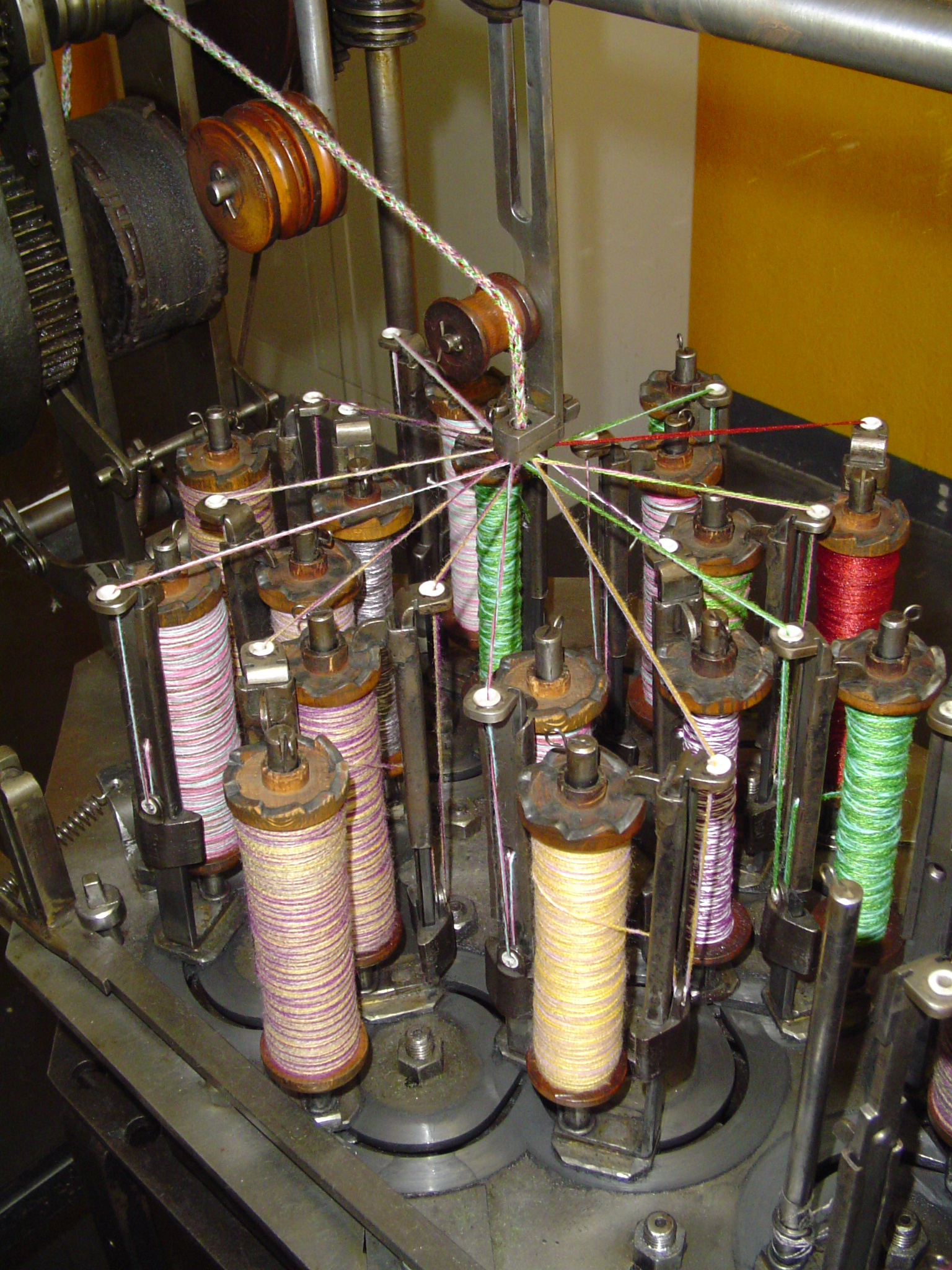 historischer Flechtmaschine von 1925 für Schnürsenkel aufgenommen im Sächsischen Industriemuseum Chemnitz